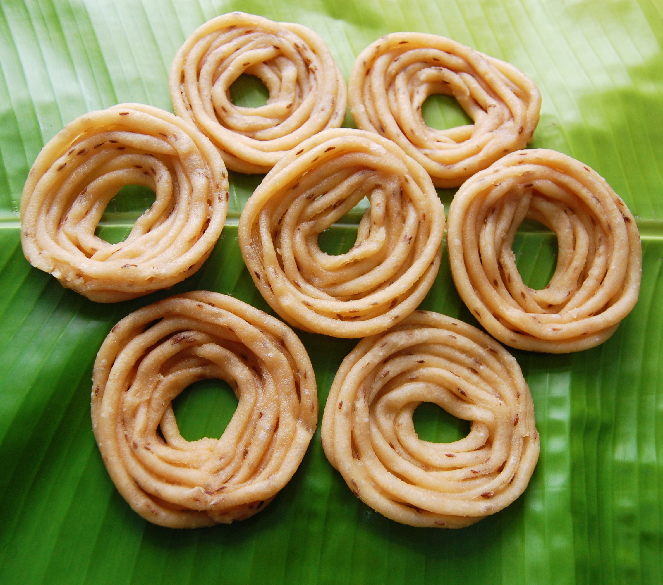 தமிழ் பலகார வகைகளுள் ஒன்றான அரிசி முறுக்கு.